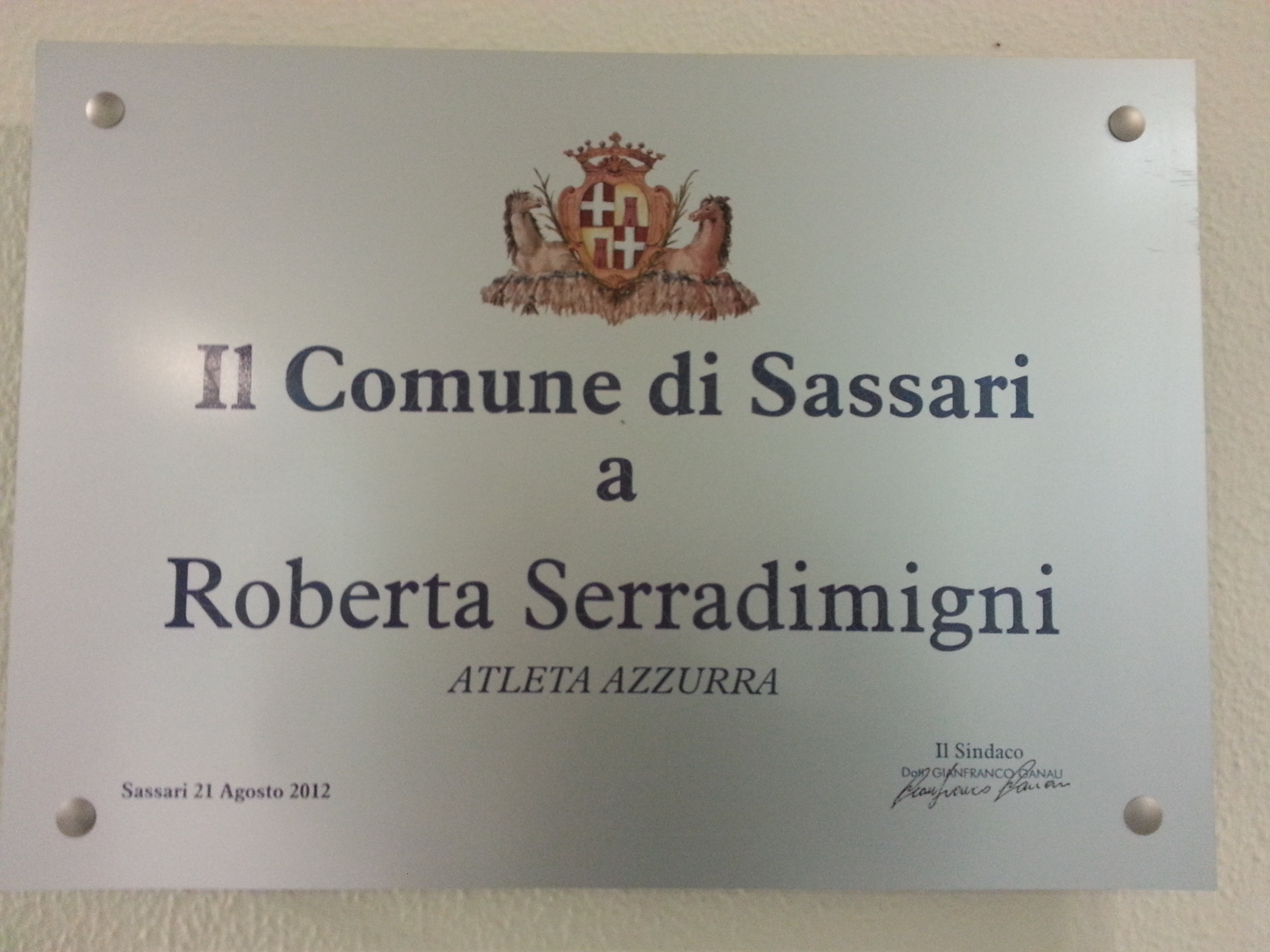 Targa all'interno del Palazzetto dello Sport di Sassari